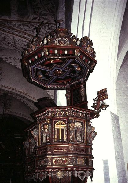 Vordingborg Vor Frue Kirke i Danmark. Prædikestol